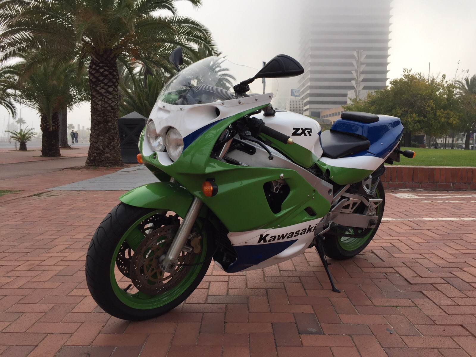 Frontal amb el bifaro clàssic de la ZXR "Telefónica"